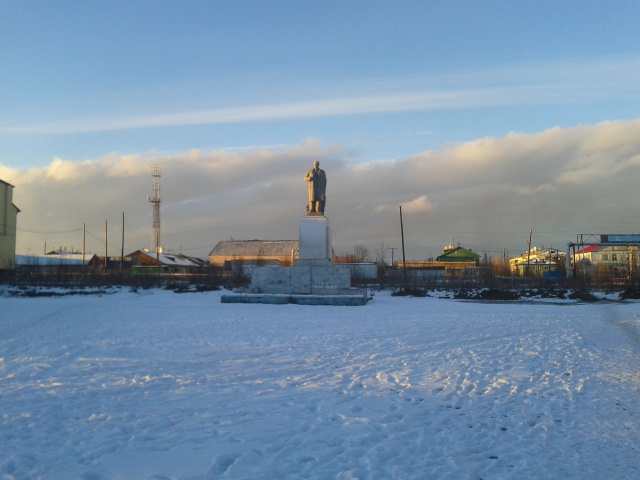 Площадь Ленина в Зырянке